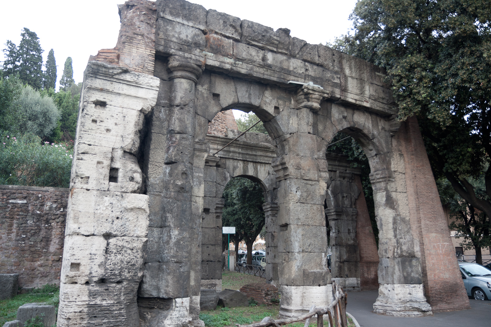 Arcadas en la Vía Triunfal